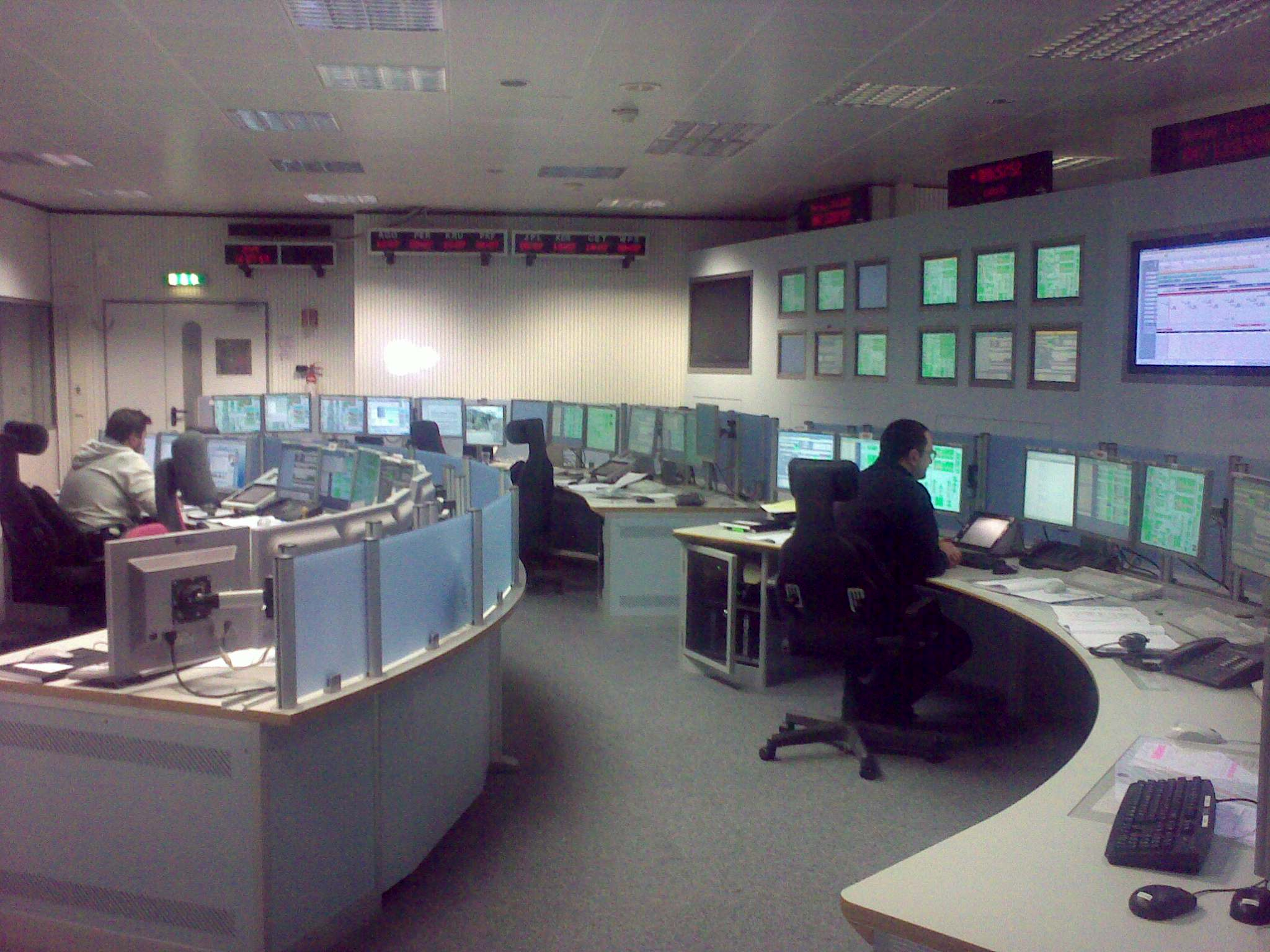 ESA/ESOC goes Social Media _10